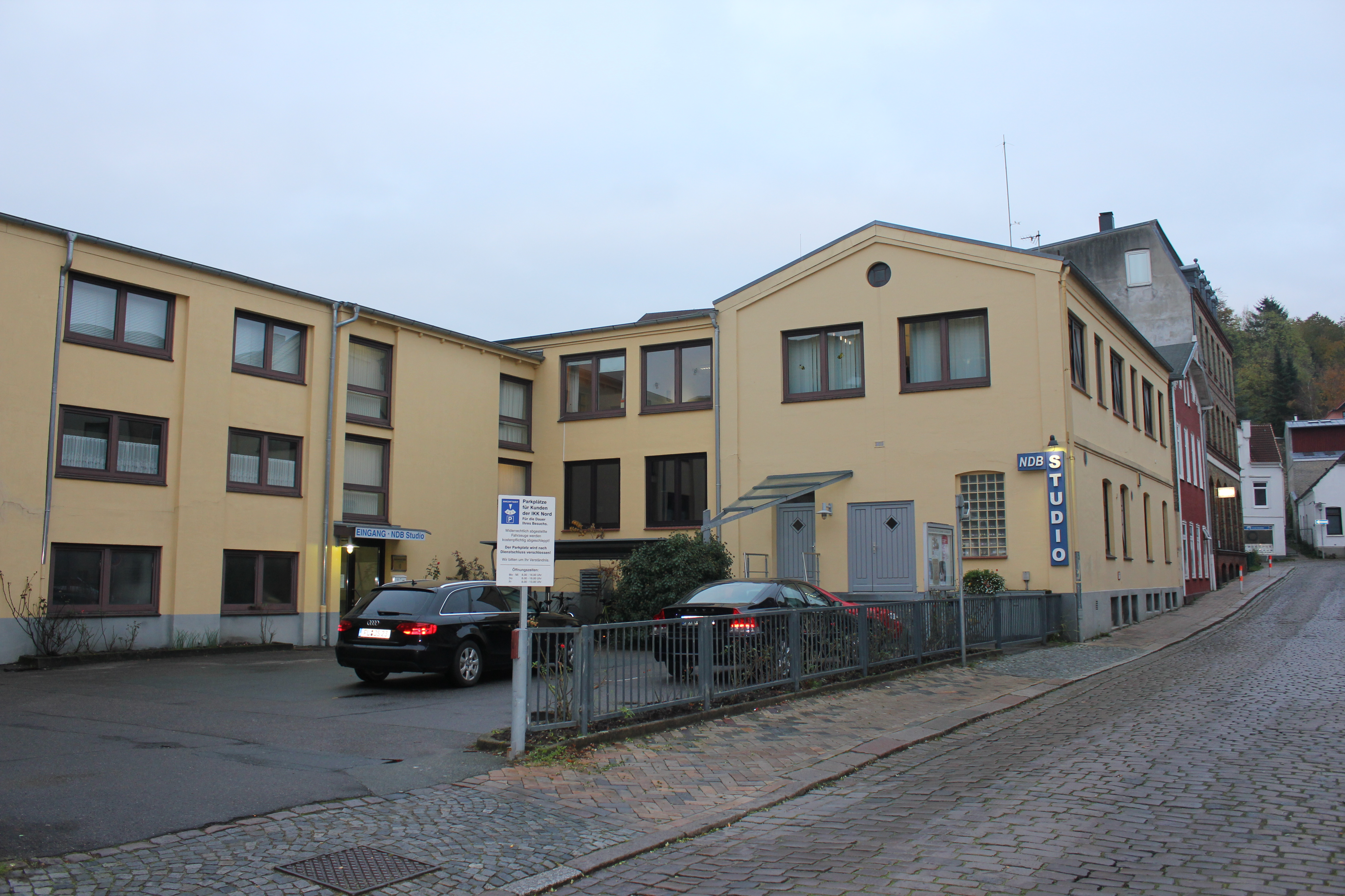 Niederdeutsche Bühne der Stadt Flensburg (Low German Theater of the Town Flensburg); Früher Gebäude von Pott-Rum